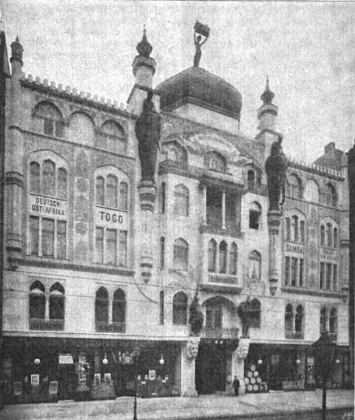 View of Deutsches Kolonialhaus (building) in Berlin